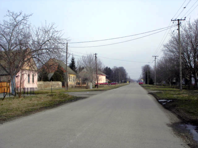 Main street in Knićanin/ Vojvodina/ Serbia.